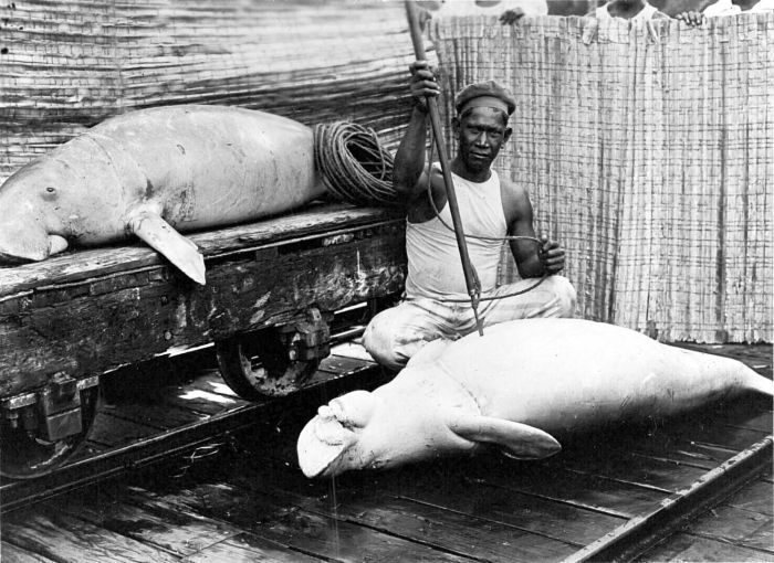 Repronegatief. De zeekoe of duyung is een in zee levend zoogdier. Het kwam (en komt) op diverse plaatsen in de Archipel voor. De grootste verspreiding van het dier is in het oosten van het eilandenrijk te vinden, maar rond Banka, net als Billiton een eiland ten oosten van Sumatra, was de duyung ook te vinden. Men gaat er tegenwoordig van uit dat dit de dieren waren die de eerste Europese zeelieden in deze streken voor zeemeerminnen hielden. Ze werden en worden bejaagd, het vlees wordt gegeten en de beenderen worden, net als ivoor, voor snijwerk gebruikt. Onder meer door de jacht, de vernieling van zijn habitat en door milieuvervuiling is het een bedreigde soort. (P. Boomgaard, 2001). Een man met twee geharpoeneerde zeekoeien te Billiton, Zuid-Sumatra